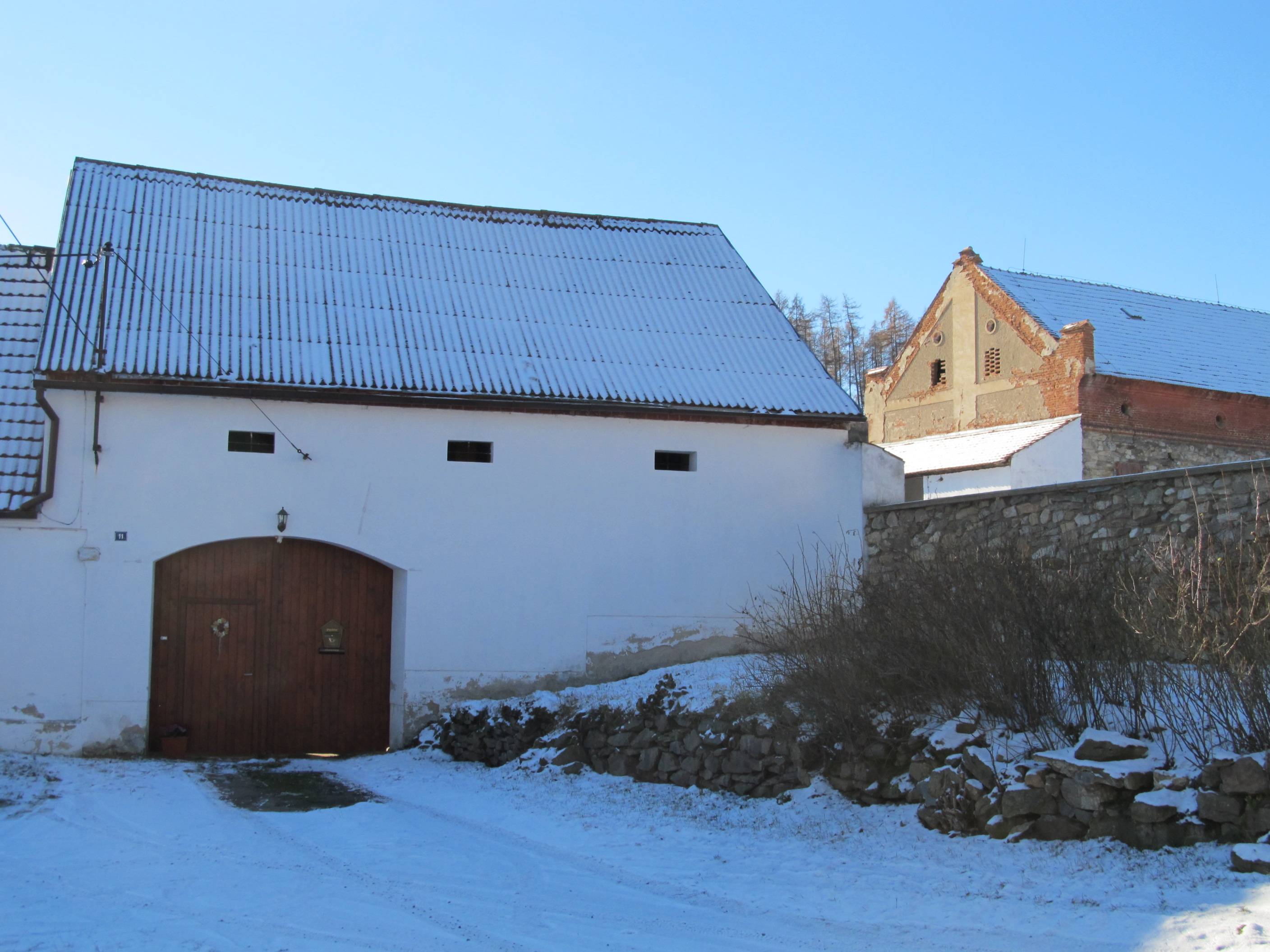 Chocholatá Lhota - tvrz